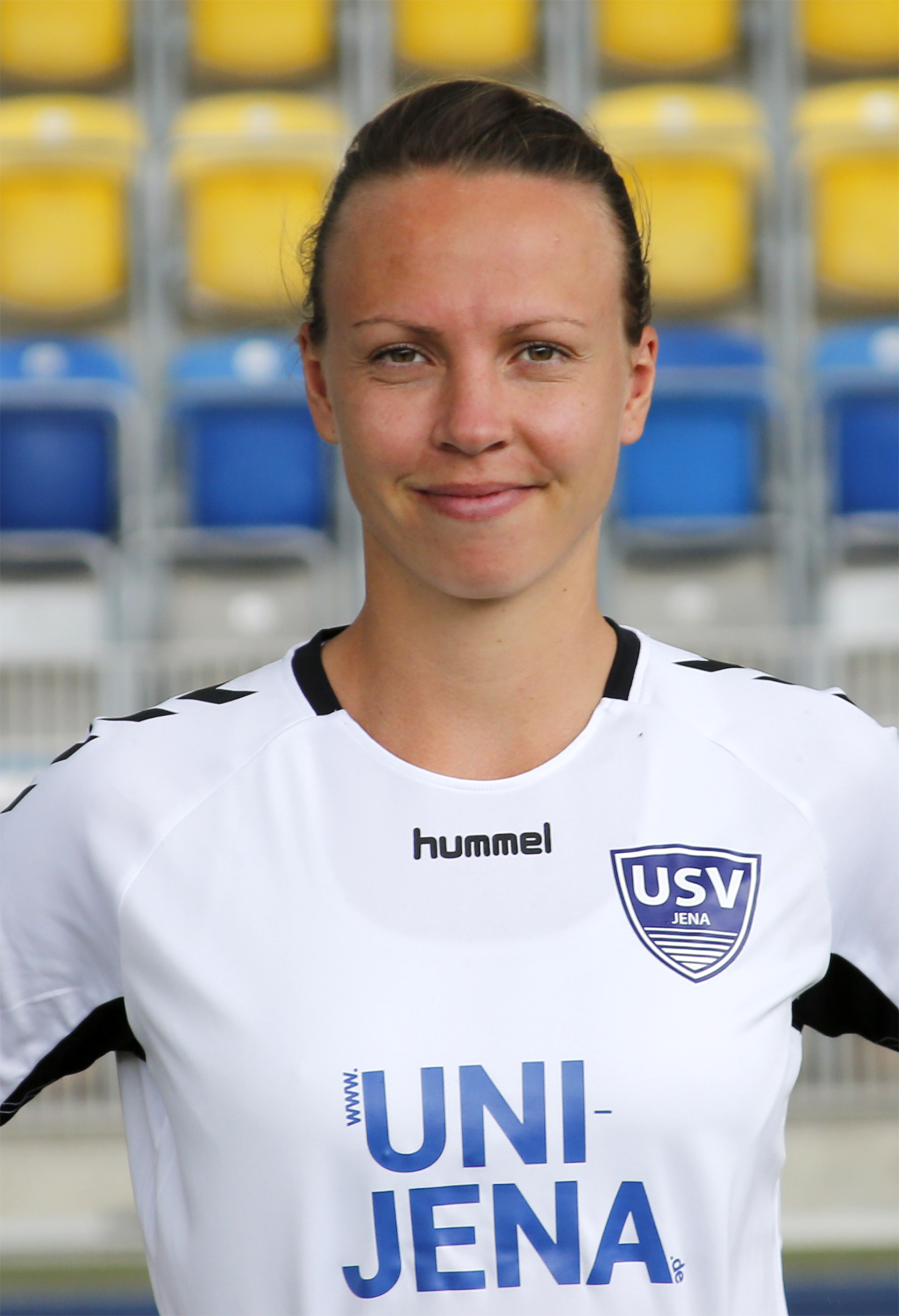 Jana Sedlackova